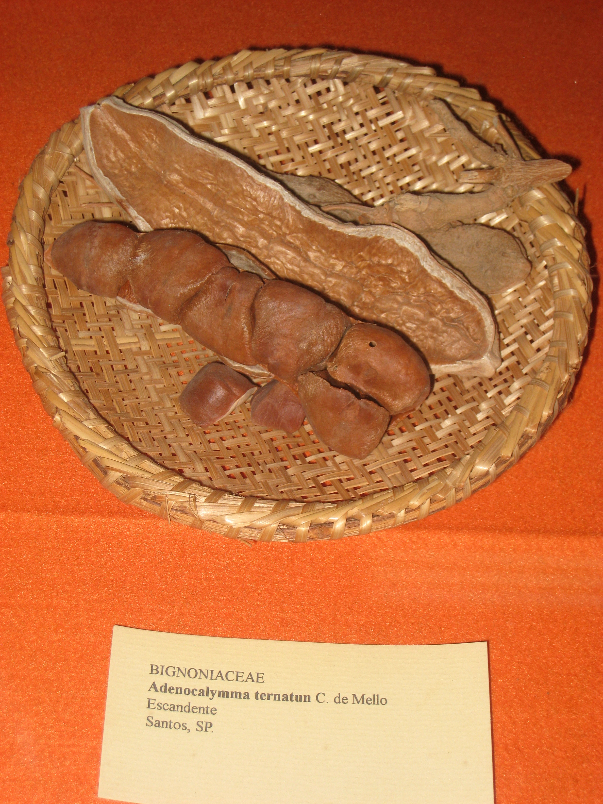 Adenocalymma ternatum specimen in the Museu Botânico Dr. João Barbosa Rodrigues, Jardim Botânico de São Paulo, São Paulo City, SP, Brazil.